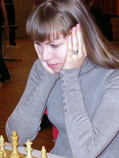 Olga Girja, Schachbundesliga der Frauen am 21. Januar 2012 in Karlsruhe.